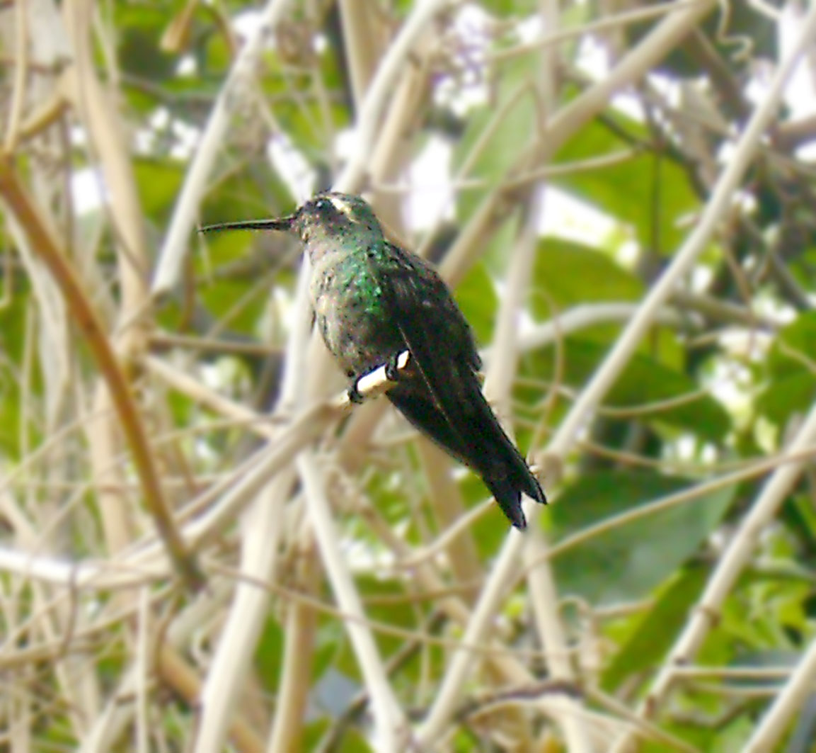 Chlorostilbon ricordii (femina) FUE TOMADA EN COJIMAR , LA HABANA, CUBA